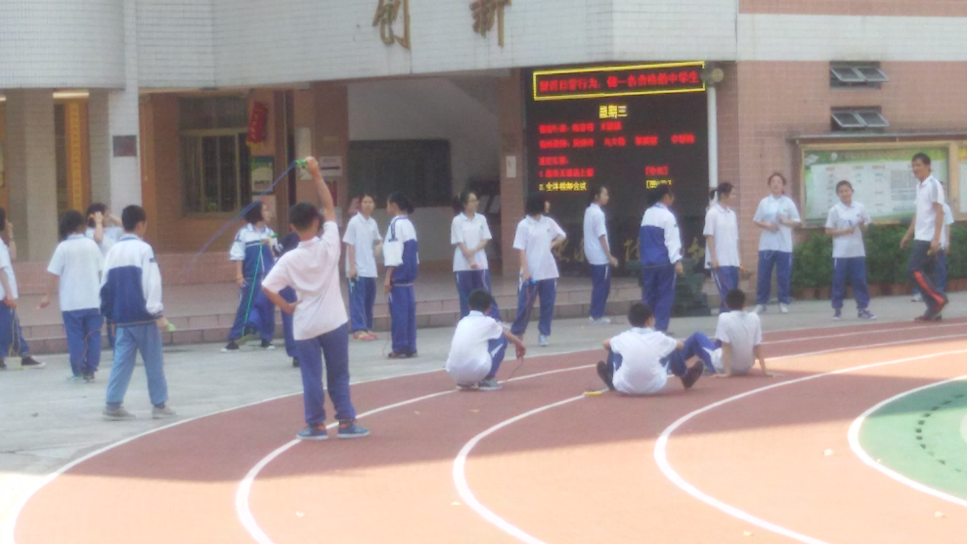 粵語: 白雲區景泰中學嘅校服